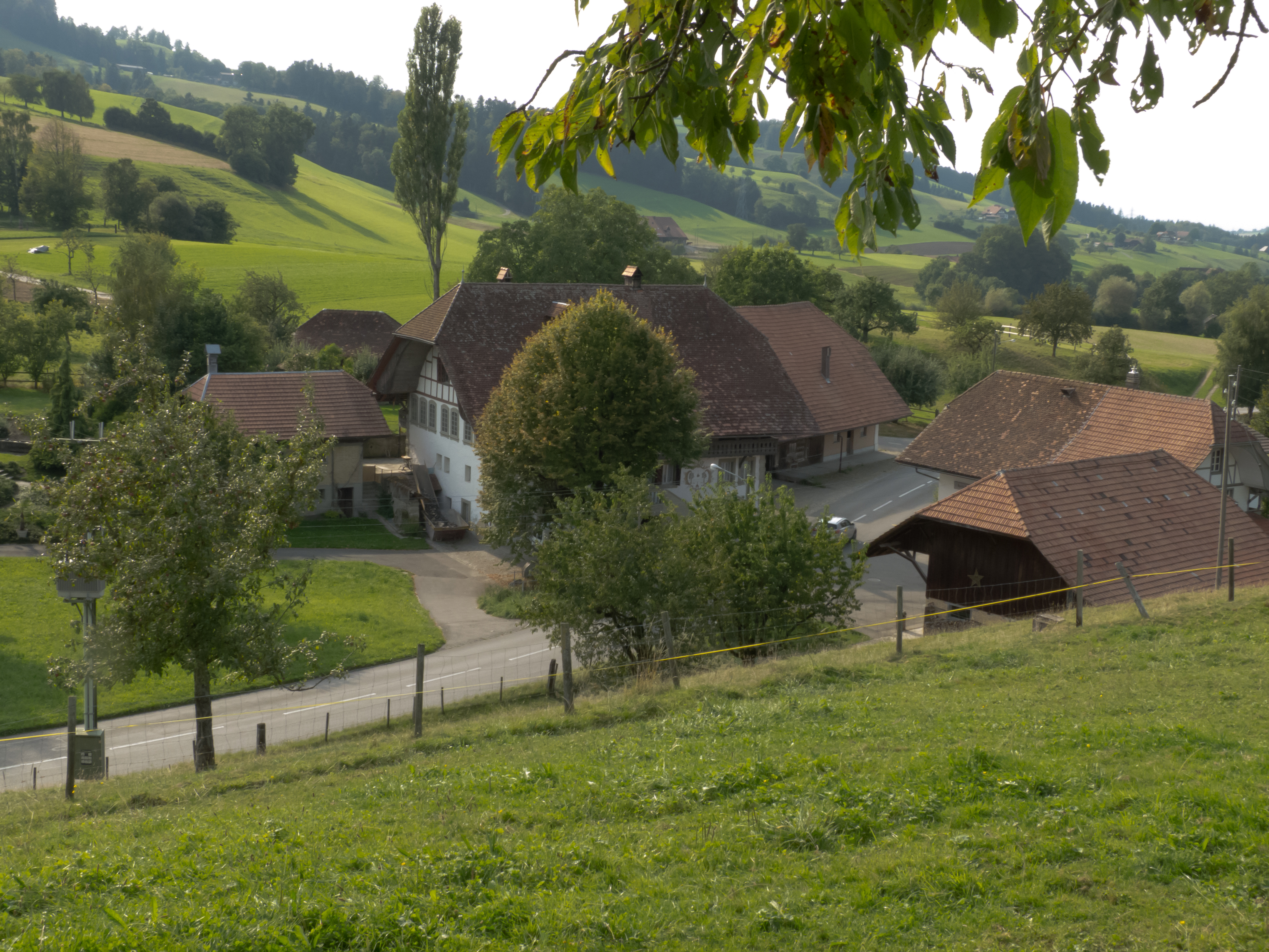 Übersicht